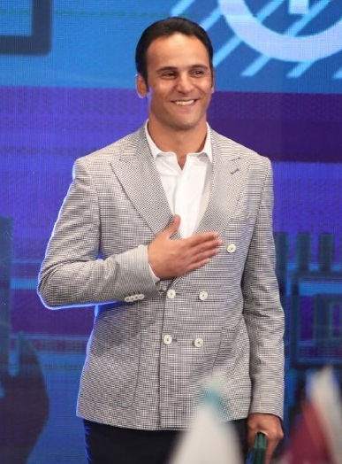 مراسم برترین‌های فوتبال ایران ۱۳۹۶-۹۷